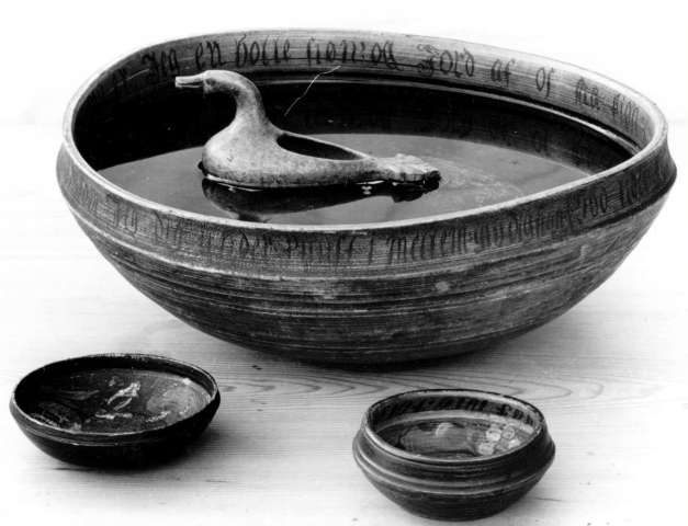 Ølbolle med ølfugl. Foto Norsk Folkemuseum. NF 08461-020